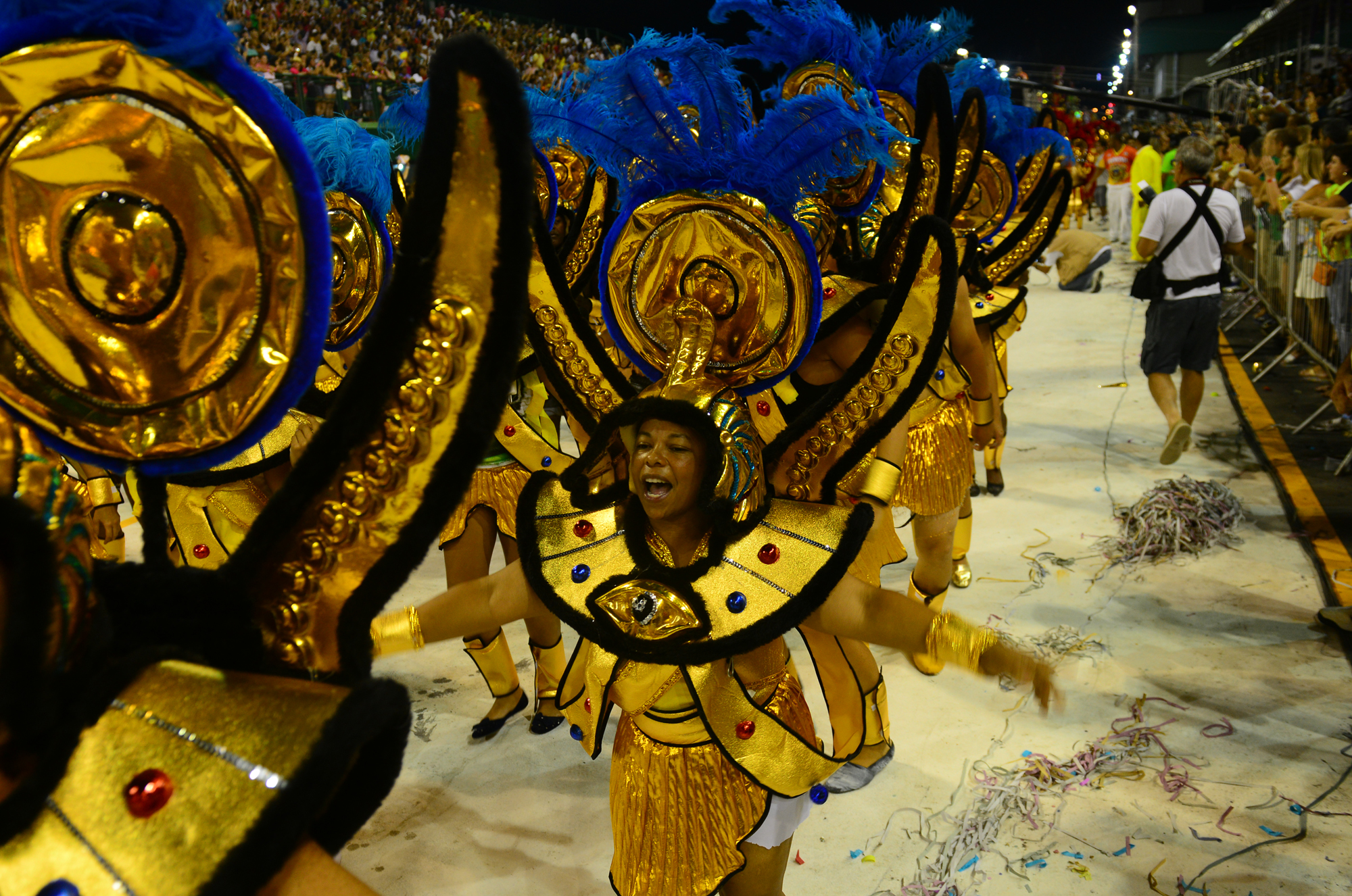 Uma ala da S.R.C.S. Embaixada Copa Lord durante o desfile das escolas de samba de Florianópolis em 2014.